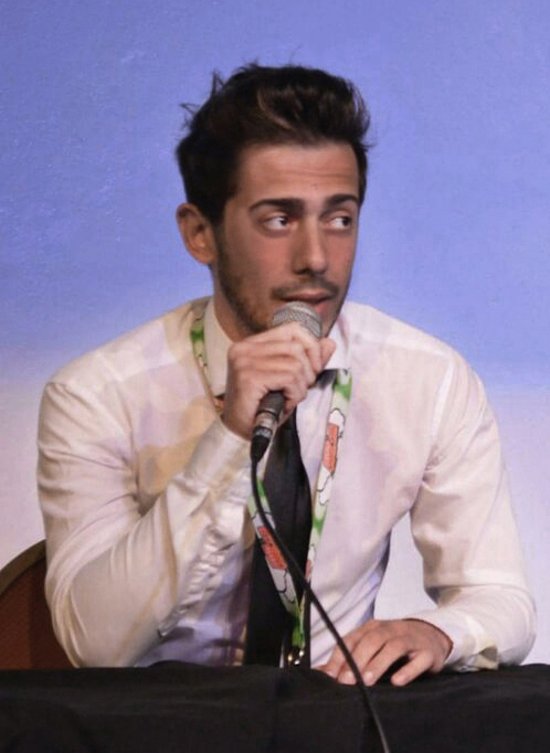 Imagen pública del director.